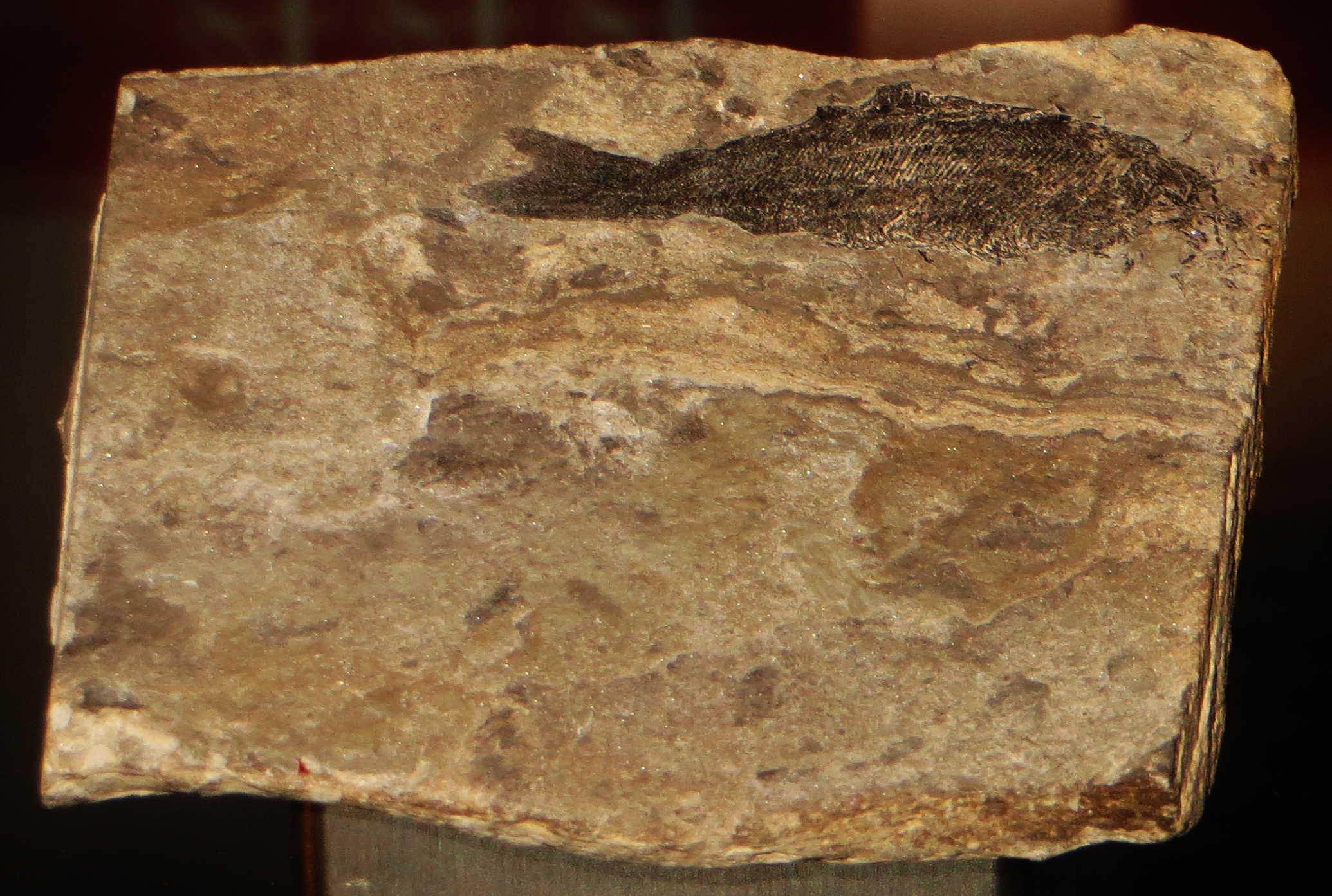 Fossil of Birkenia - Took the picture at Museon, Den Haag